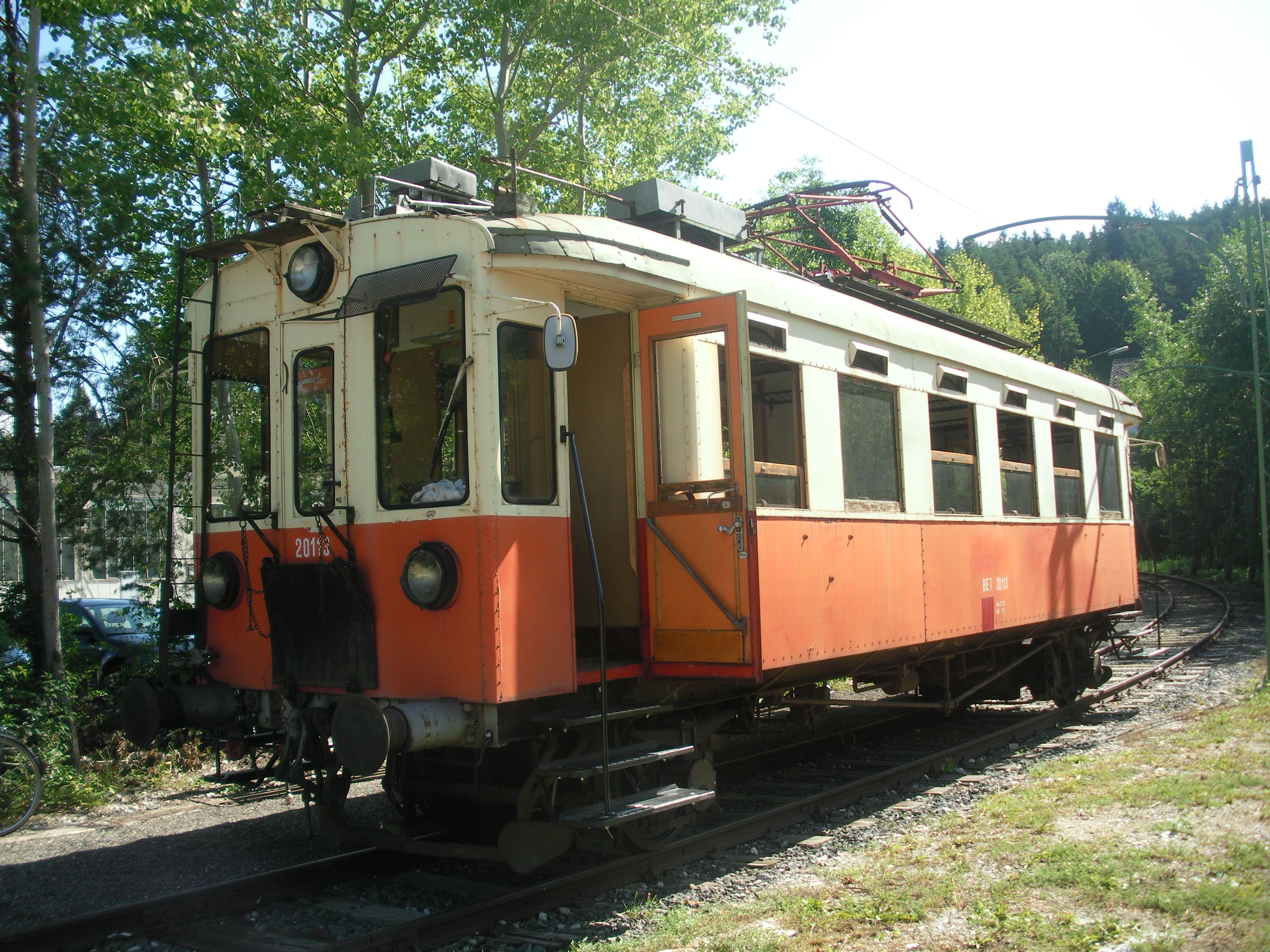 Fahrzeug der Histotram Ferlach